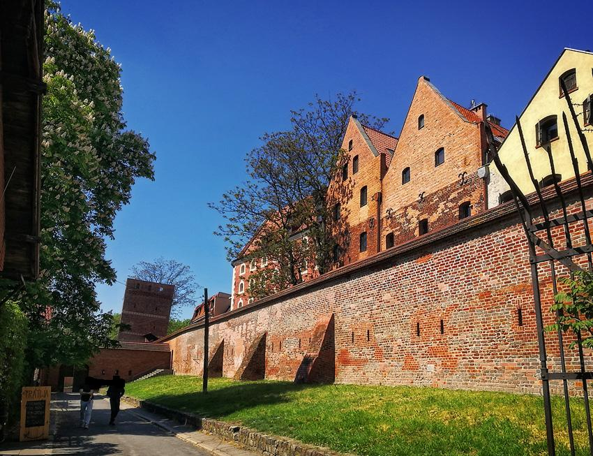 Mury miejskie Torunia, ul. Flisacza